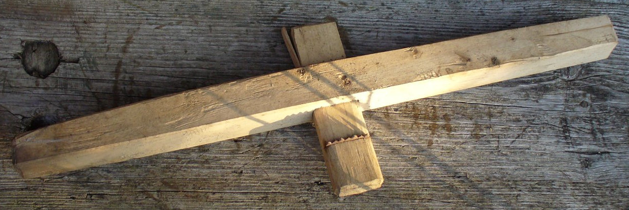 Инструмент для пропиливания пазов под днища в бондарных изделиях. Витебская обл. городокский район. деревня Ивановка.